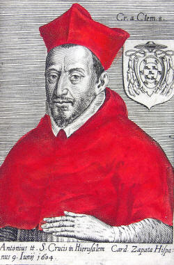 Cardenal Antonio Zapata y Cisneros (1550-1635)